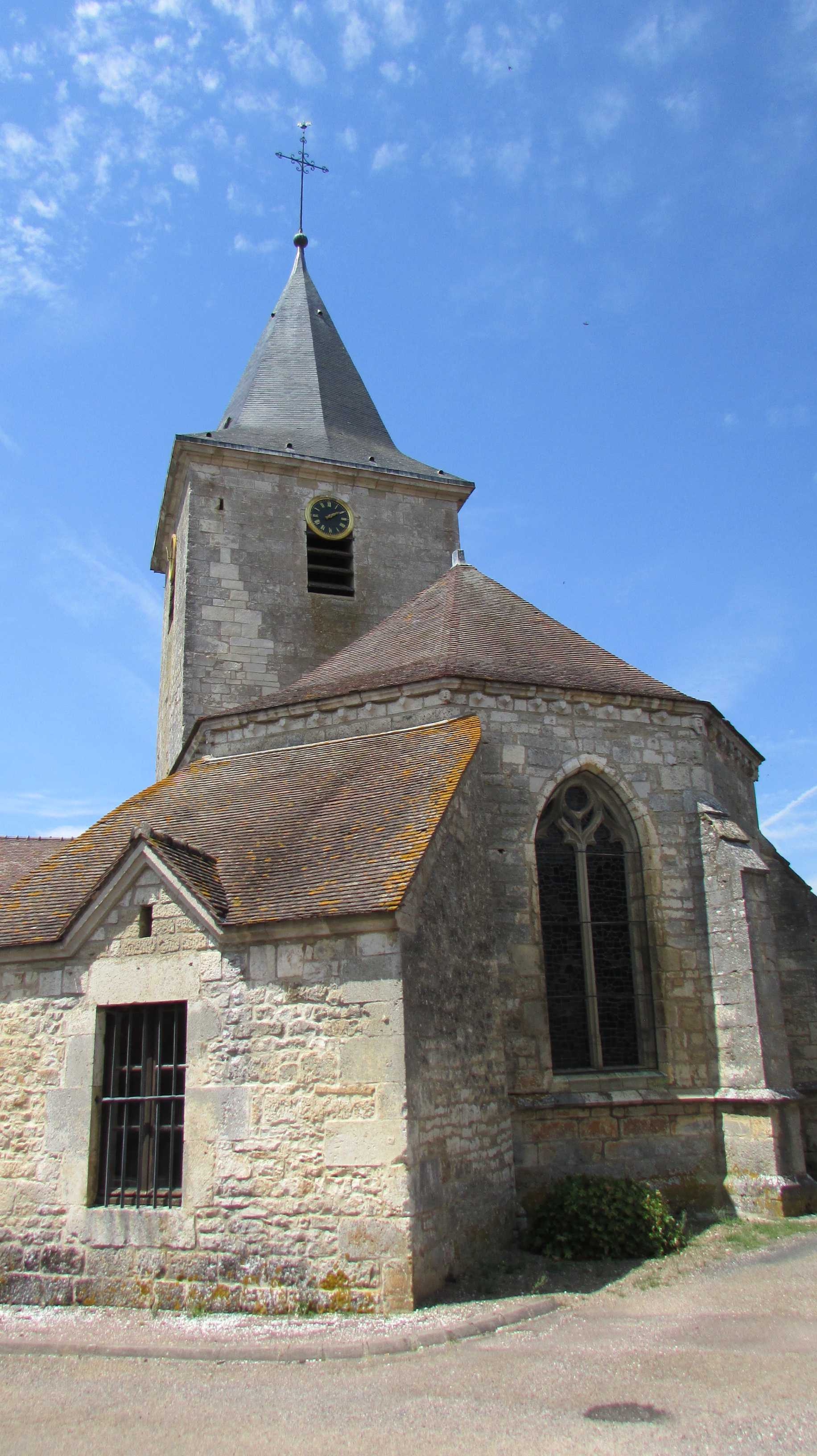 Léglise